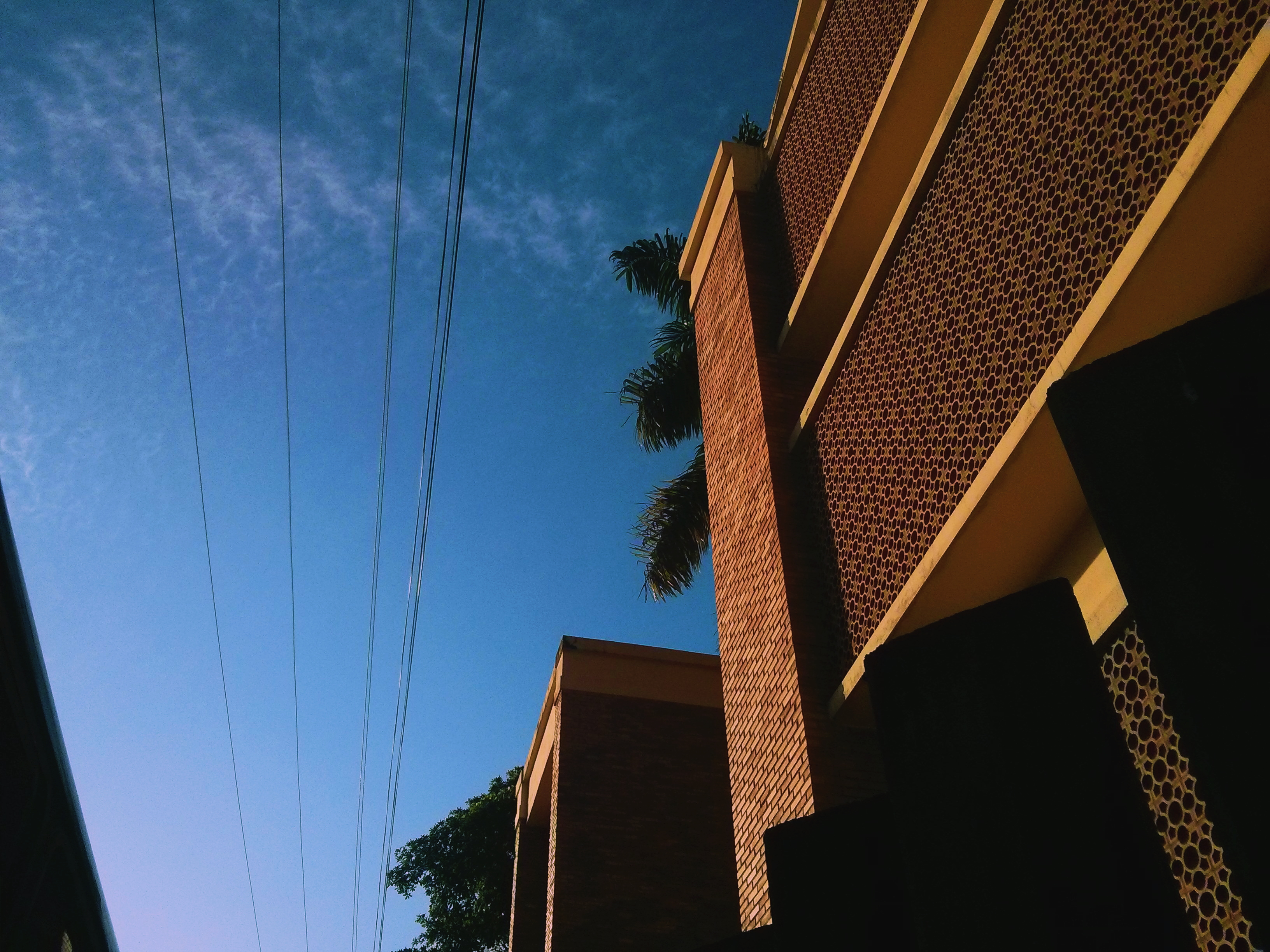 Prédio 6